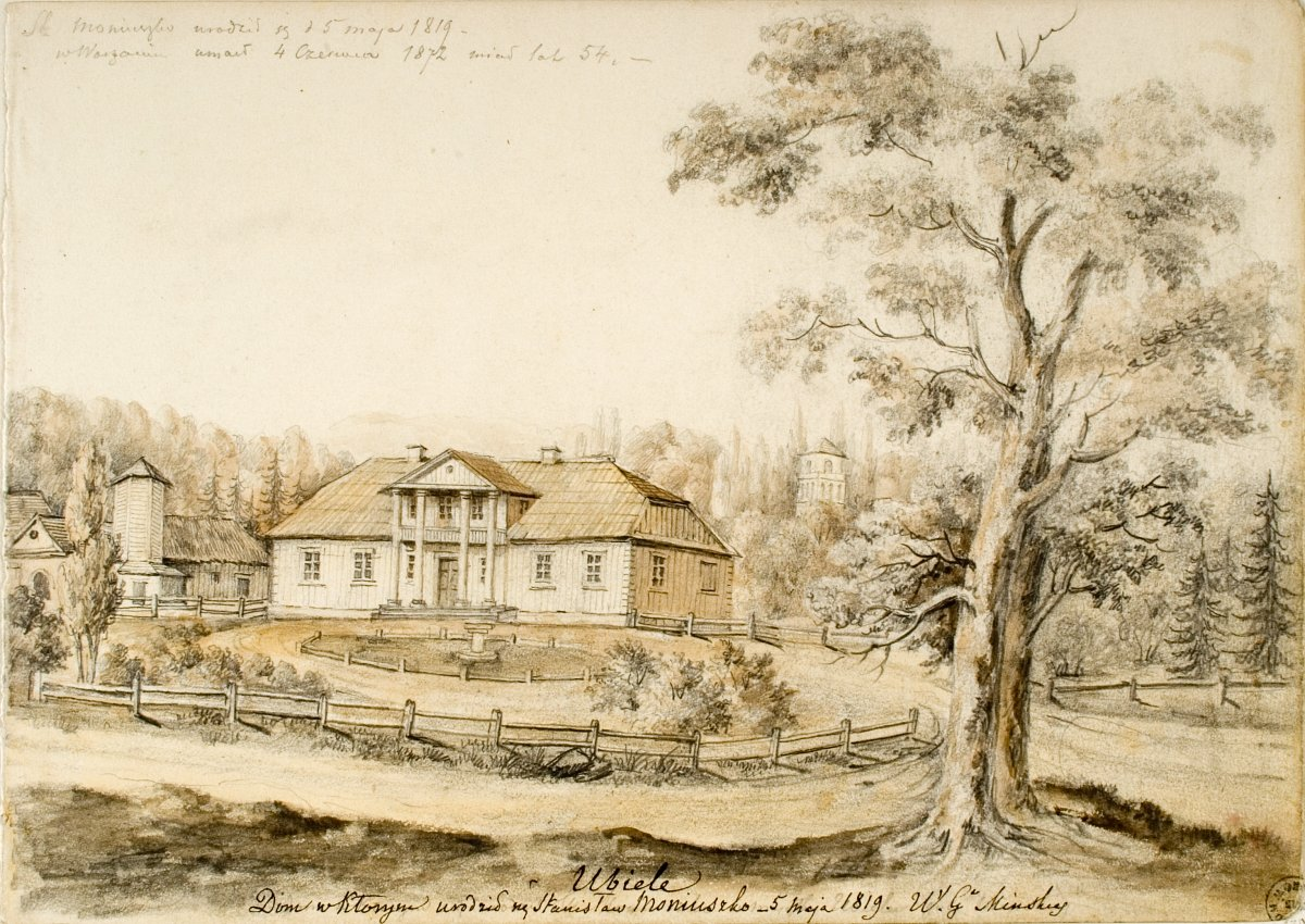 Беларуская (тарашкевіца): Убель (Ubiel), сядзіба Манюшкаў (Maniuška)